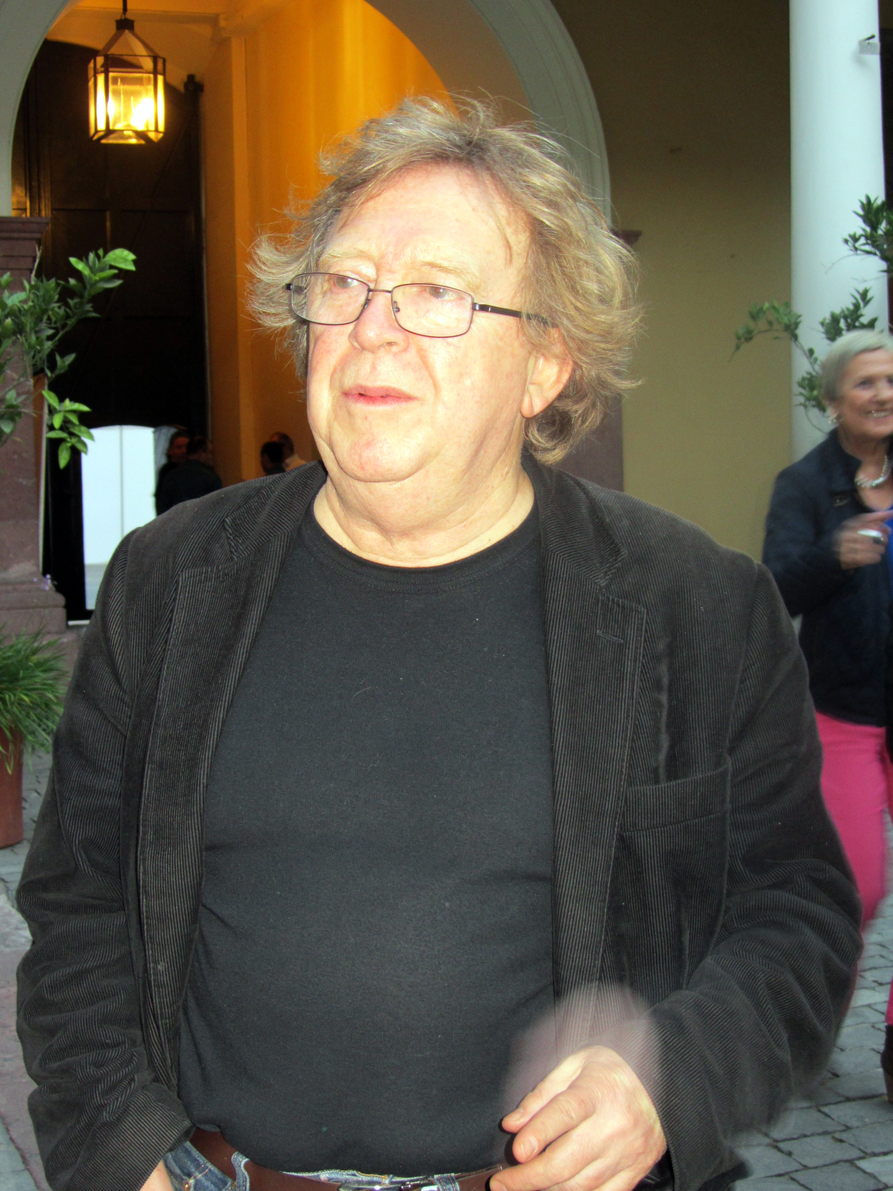 El poeta chileno Juan Cameron en una velada de homenaje a Gonzalo Rojas celebrada en el Museo Histórico Nacional, abril 2013